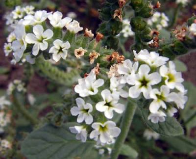 Heliotropium europaeum, flowers